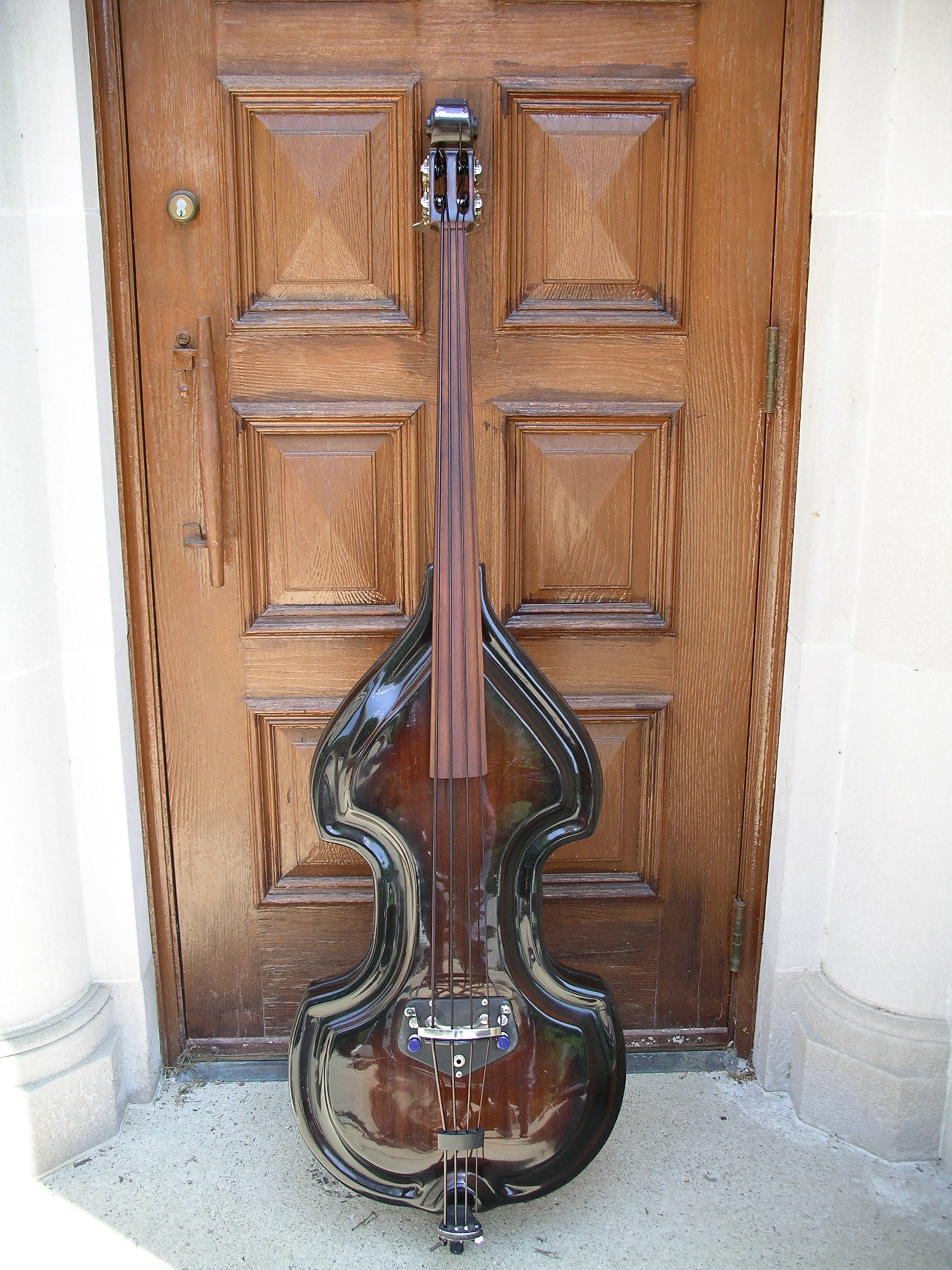 primer modelo de BB ampeg (sin tiracuerdas)